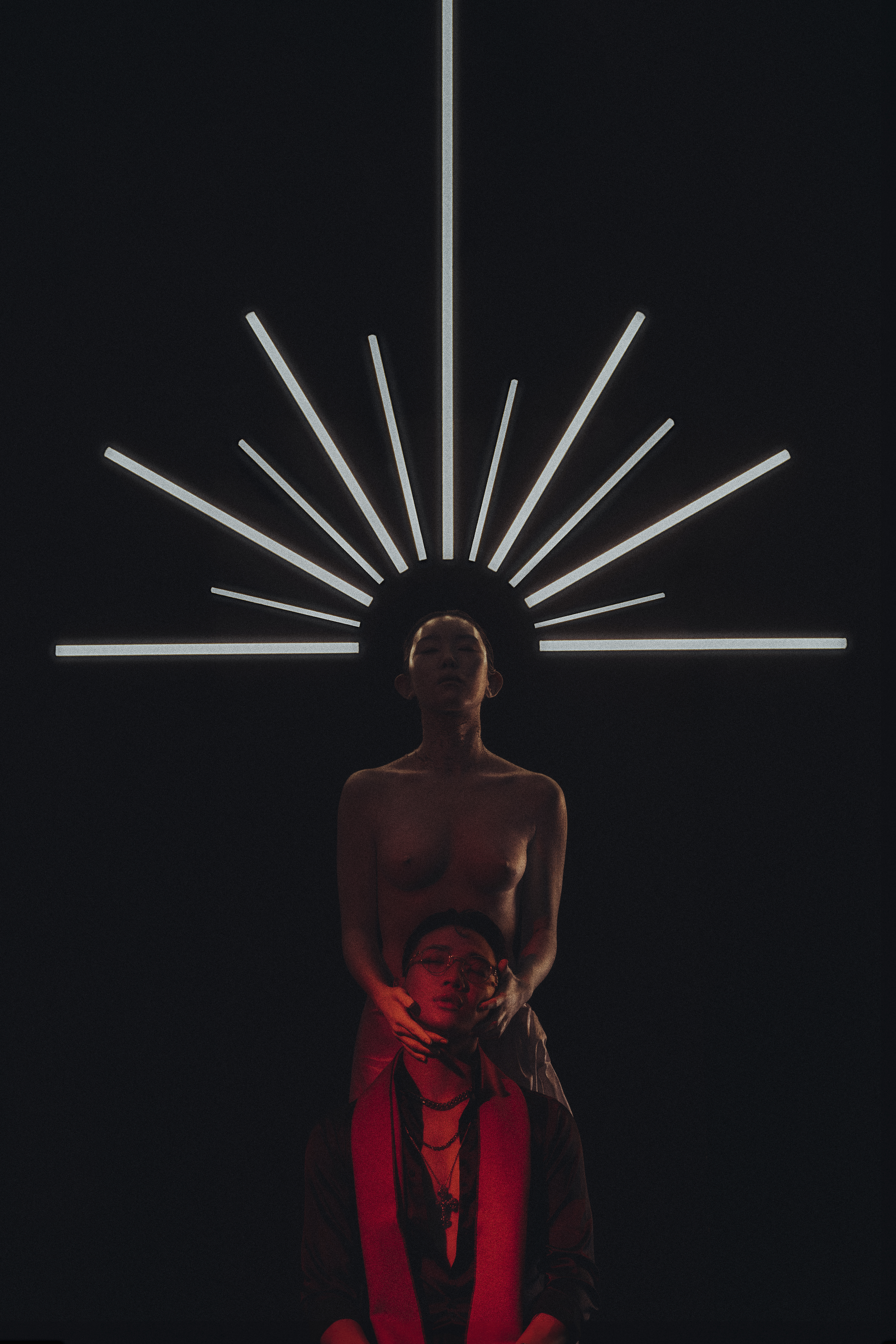 傳教士單曲